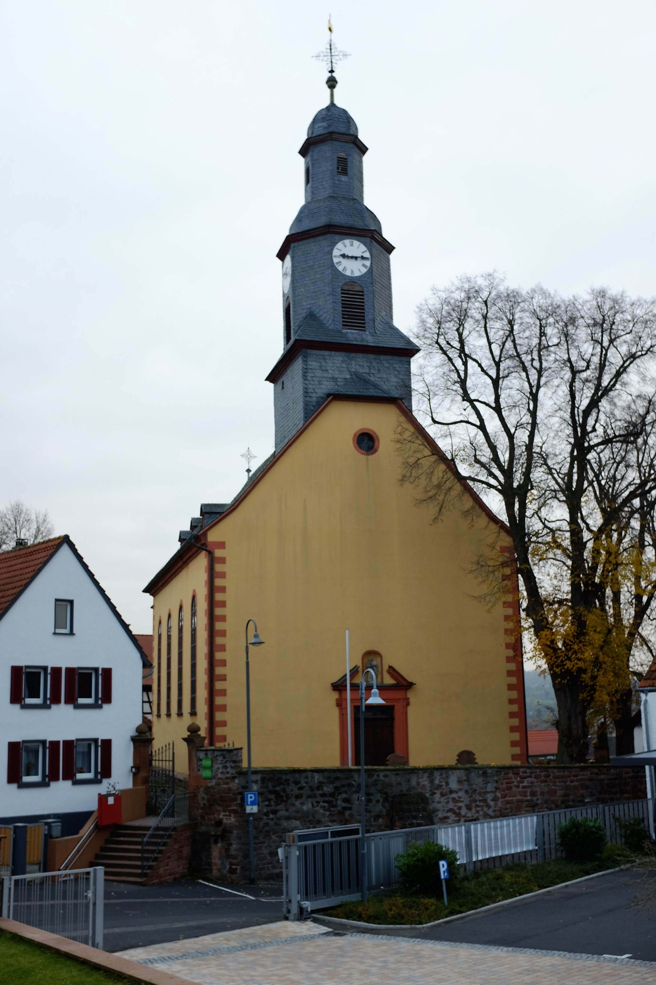 Kath. Kirche Mariä Verkündigung, Heldenbergen, Nidderau, Main-Kinzig-Kreis, Hessen, Deutschland